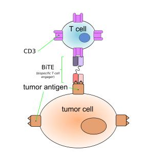 מנגנון הפעולה